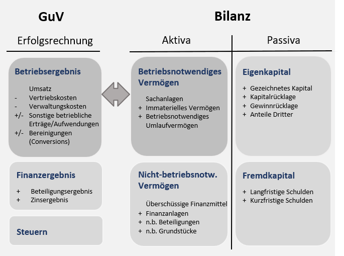 Betriebsnotwendiges Kapital